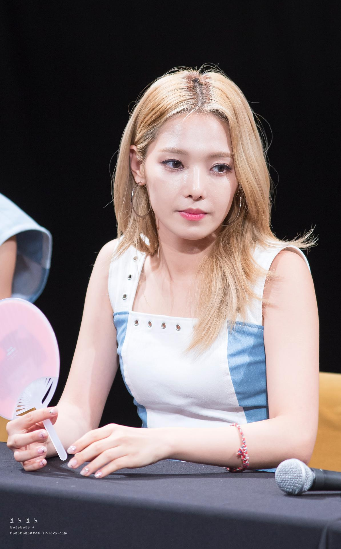 170730 KARD 강남 팬싸인회